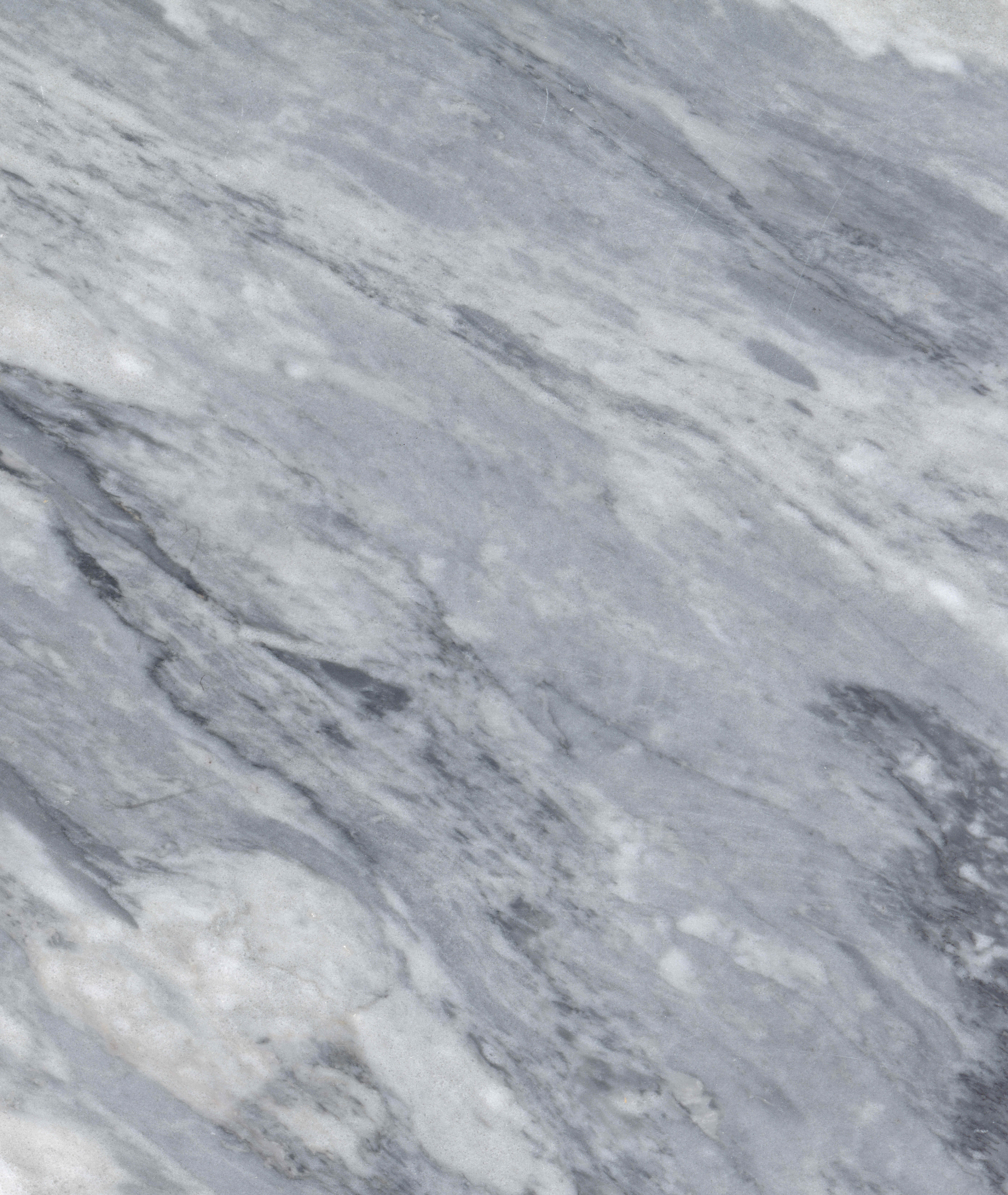 Bardiglio, Carrara-Marmor, Handelssorte